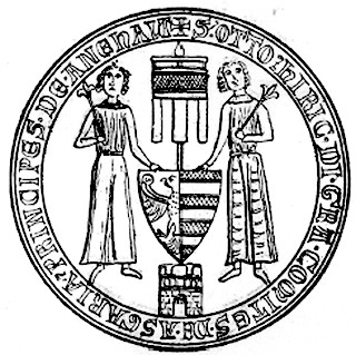 Heinrich I und Otto - 1269